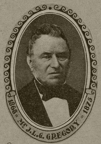 Joan Lodewijk Gerhard Gregory (1808-1891)